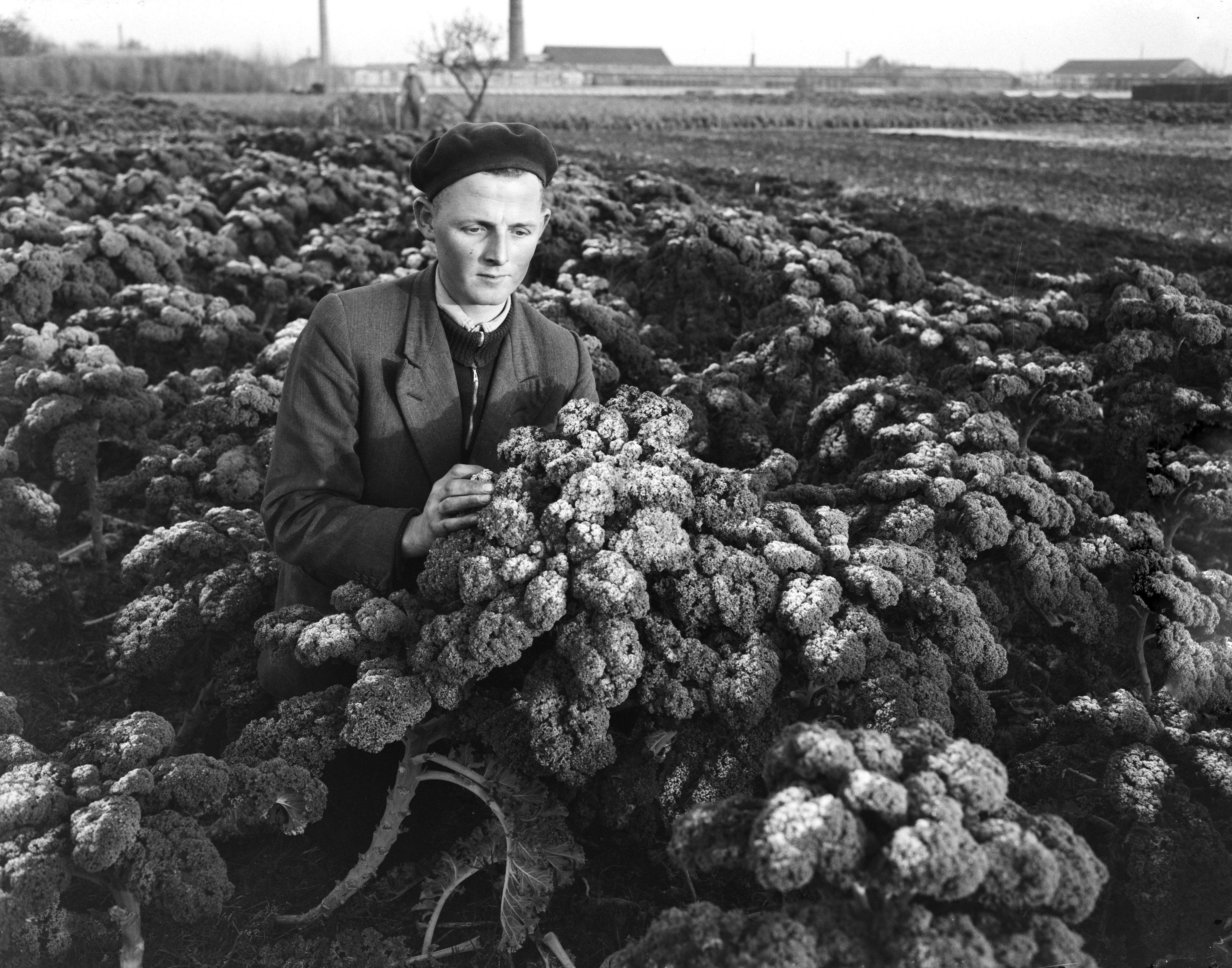 Collectie / Archief : Fotocollectie Anefo Reportage / Serie : [ onbekend ] Beschrijving : Eerste vorst in ons land, tuinder boerenkoolpluk Datum : 13 december 1955 Trefwoorden : VORST, tuinders Fotograaf : Duinen, […] van / Anefo Auteursrechthebbende : Nationaal Archief Materiaalsoort : Negatief (zwart/wit) Nummer archiefinventaris : bekijk toegang 2.24.01.04 Bestanddeelnummer : 907-5014